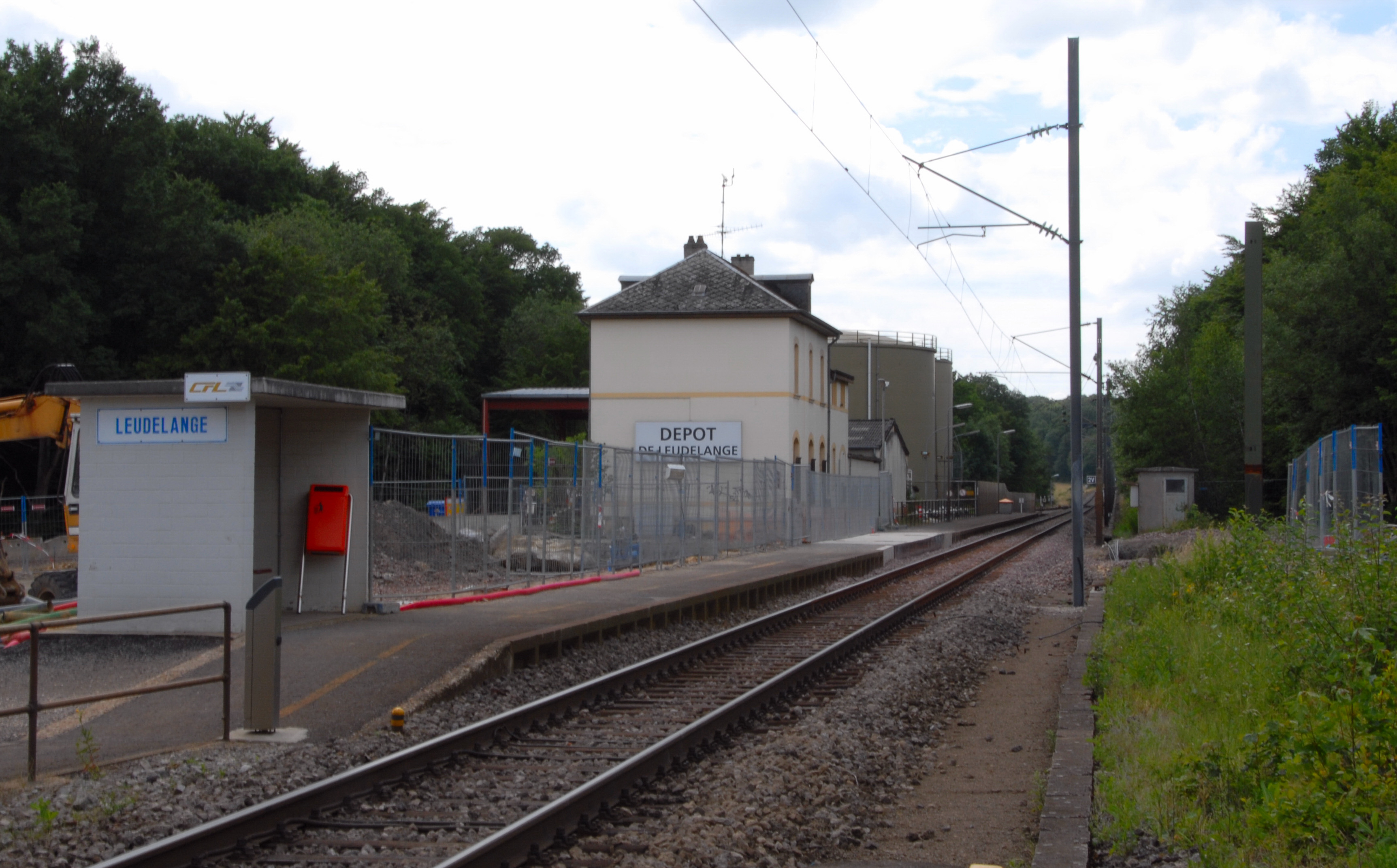 Sujet: D'Gare vu Leideleng Auteur: Fliedermaus Source: Eege Photo vum 17. Juni 2007 Lizenz: GFDL